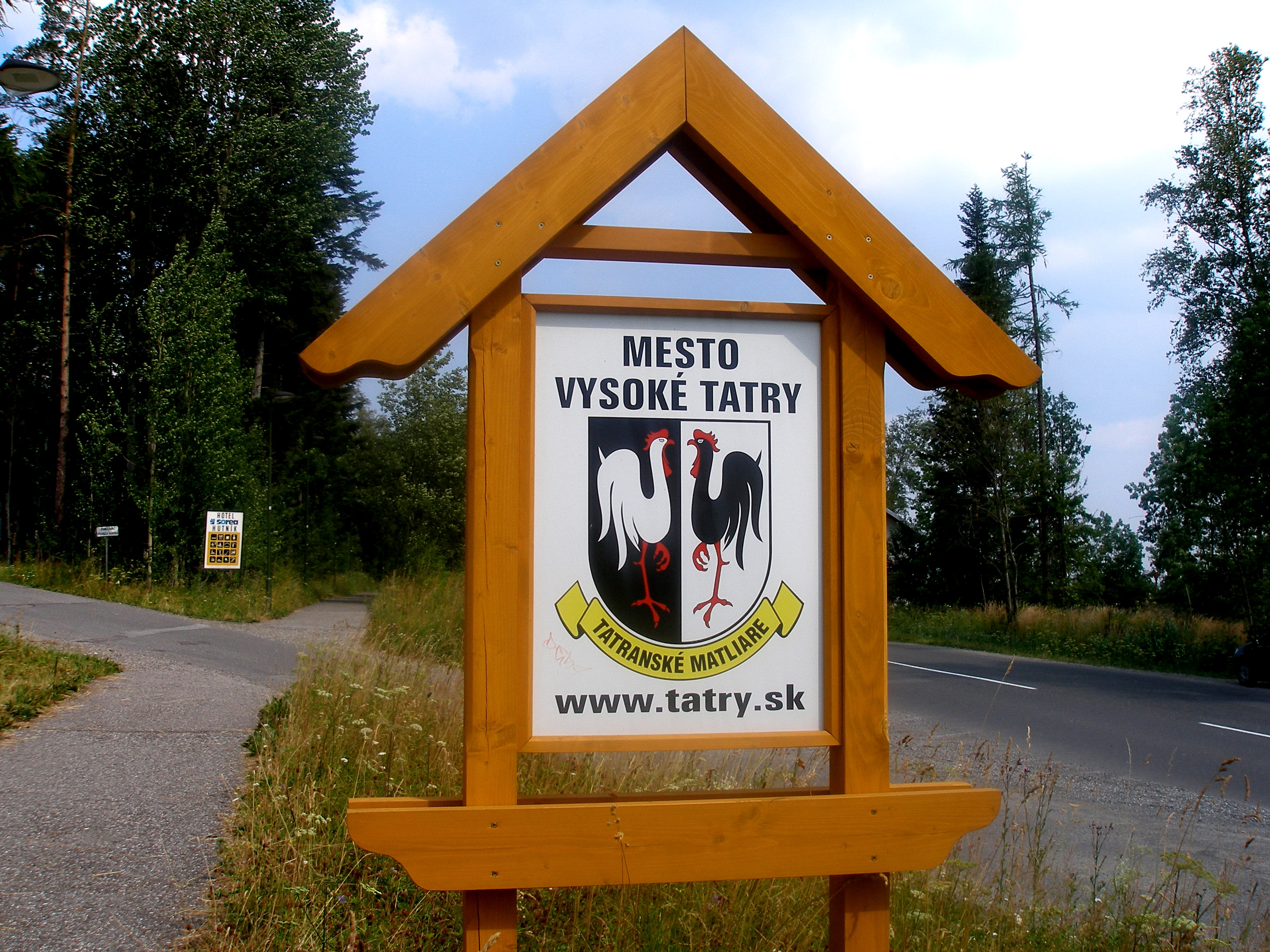 Osada Tatranské Matliare, Slovakia